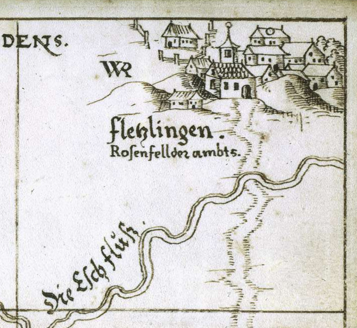 Württembergisch-rottweilische Grenze zwischen Flözlingen Rosenfelder Amts und dem rottweilischen Ort Horgen an der Eschach / Gadner und Zeitgenossen (1585)-bearbeitet